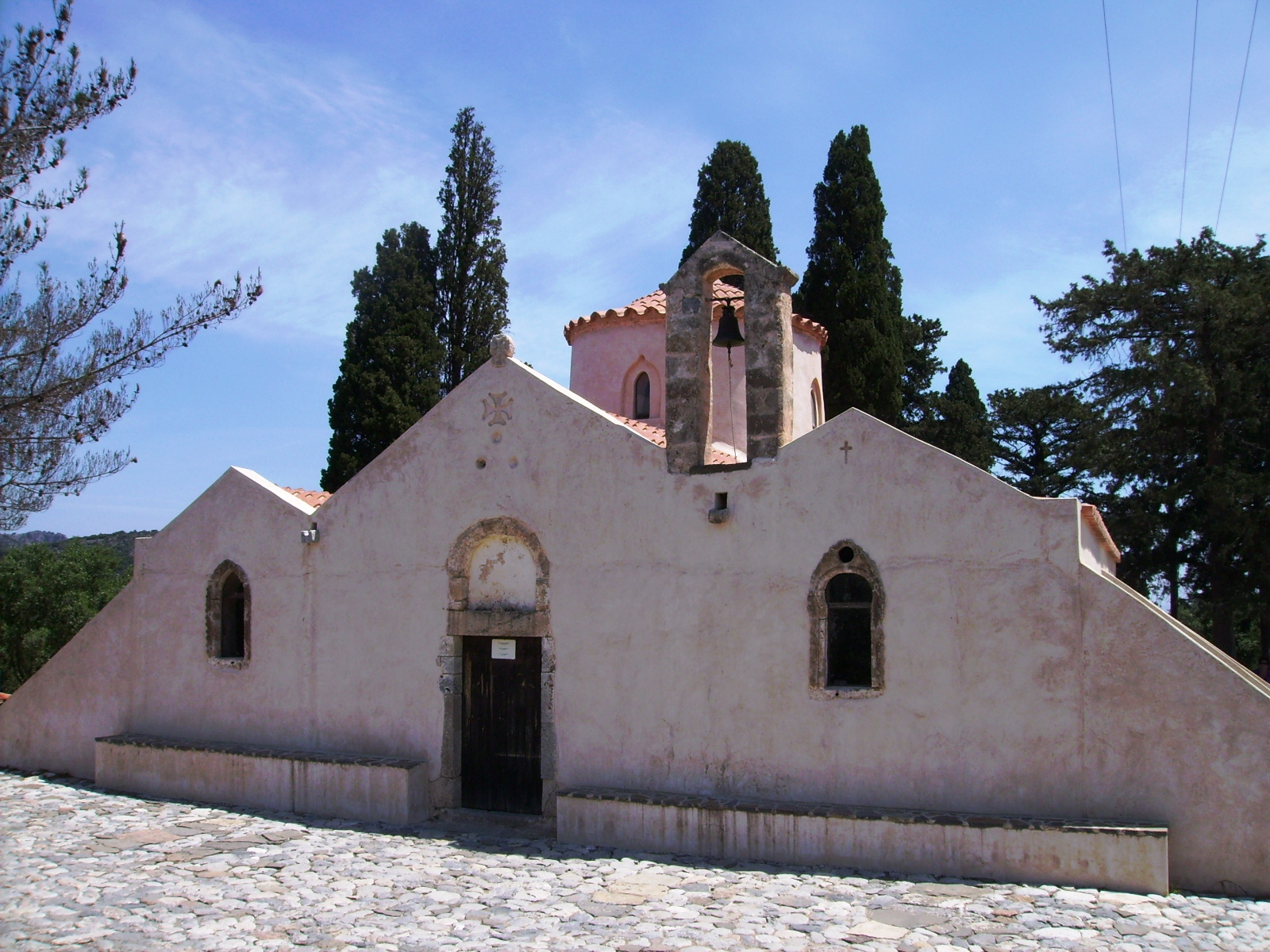 Panhagia Kera, byzantinische Kirche mit bedeutenden Fresken bei Kritsa (Kreta)